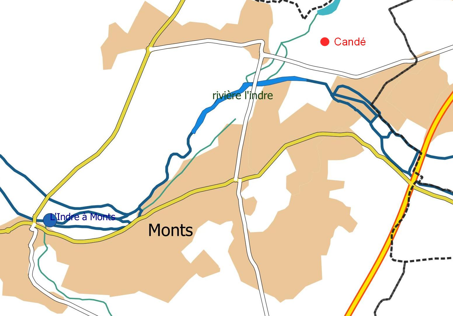 Emplacement du domaine de Candé sur la commune de Monts